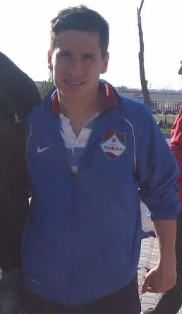 Gökhan Alsan